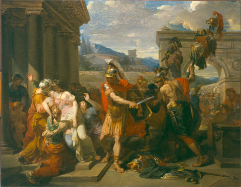 Jean-Baptiste Frédéric Desmarais, Horace tue sa soeur Camille, 1785, Paris, Ecole Nationale Supérieure des Beaux-Arts